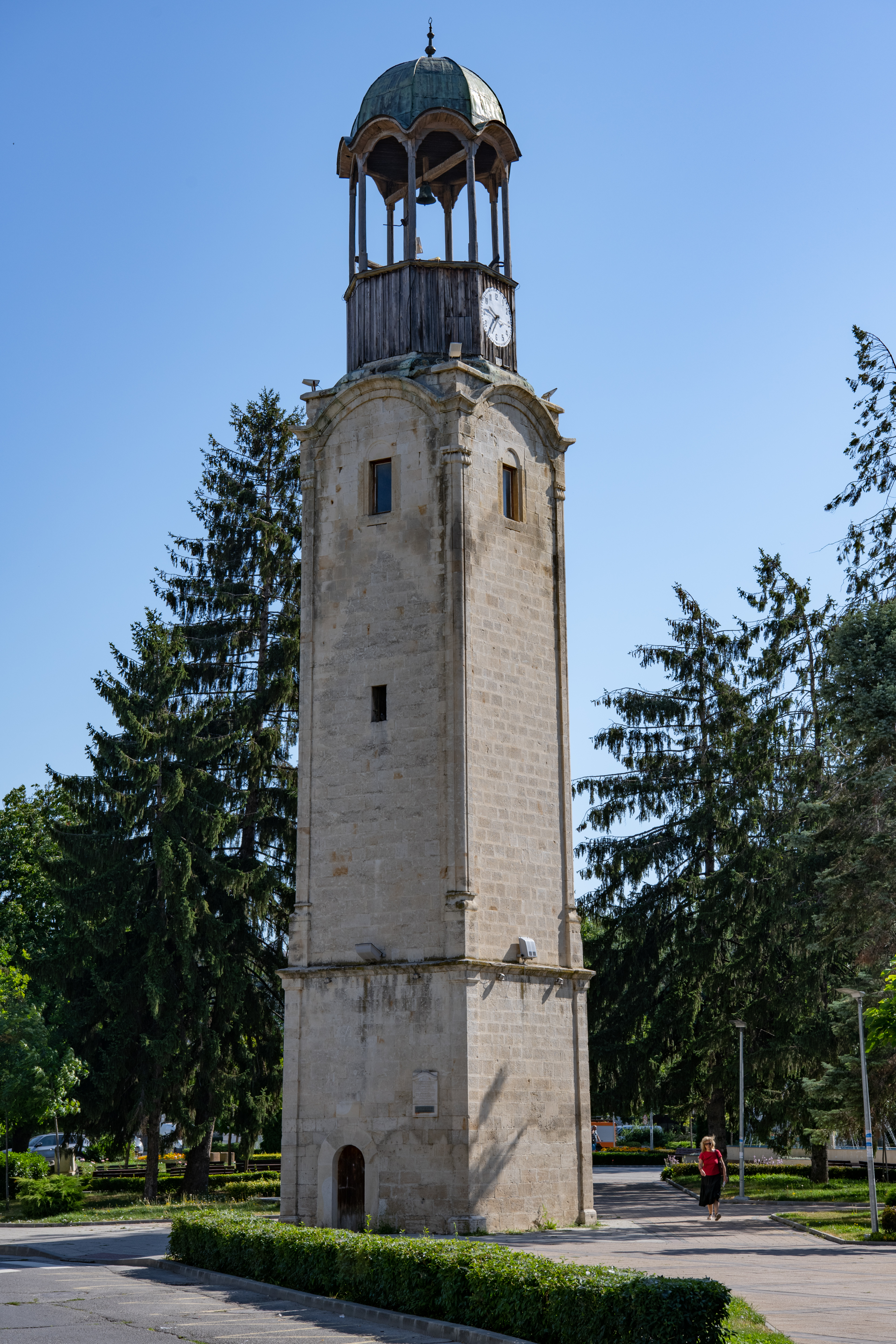 Снимката документира часовниковата кула в Разград